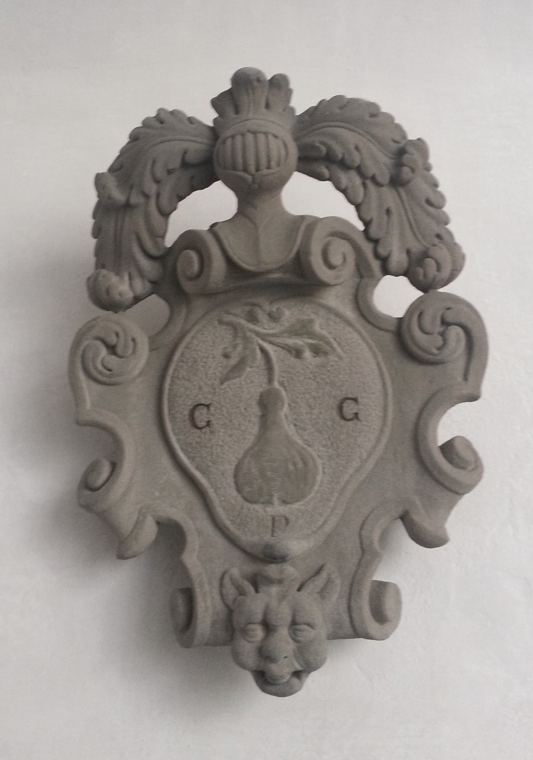 Stemma Ginami all'interno del castello Ginami-Buccelleni